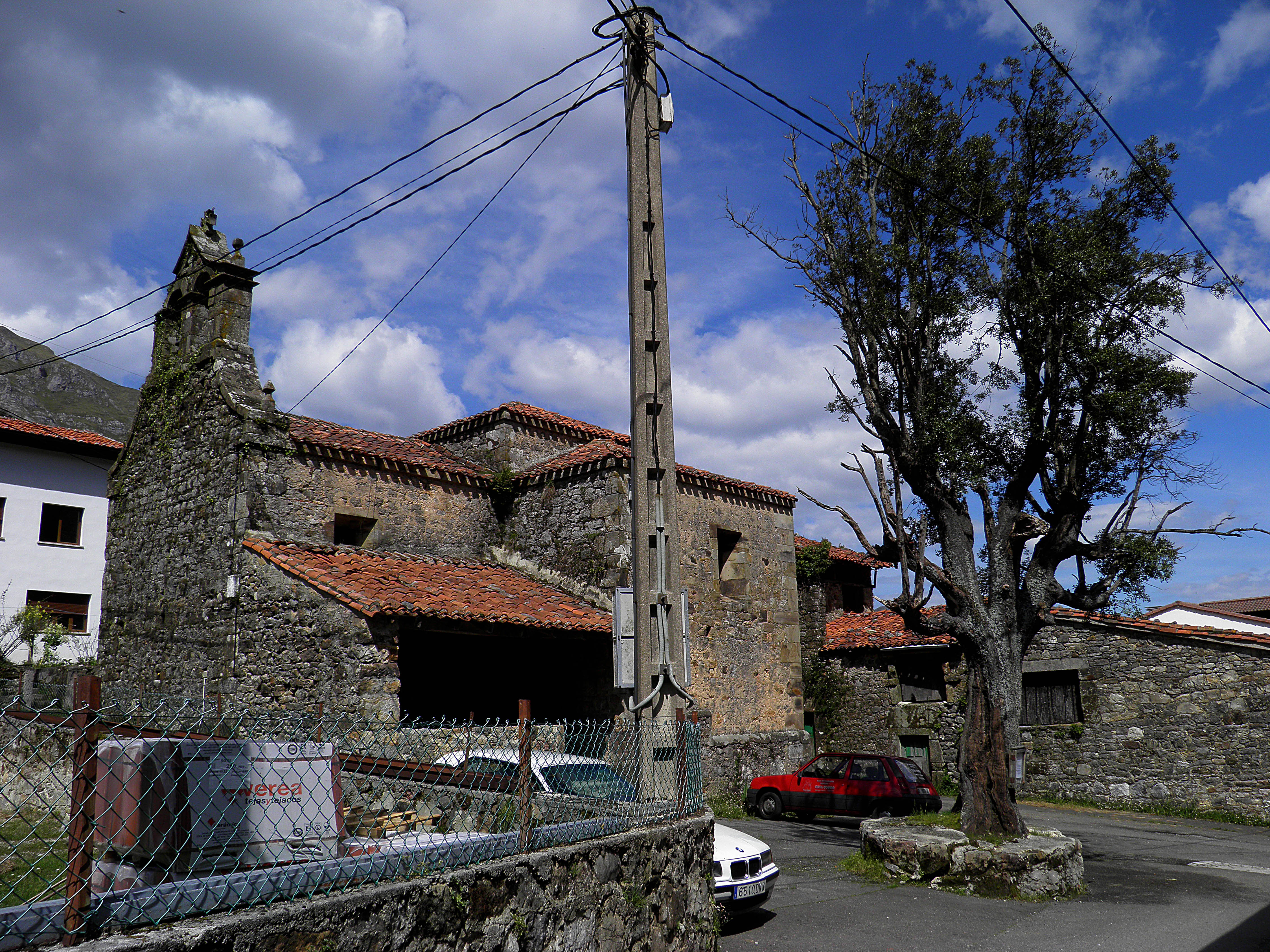 Rozagás (Peñamellera Alta, Asturias)